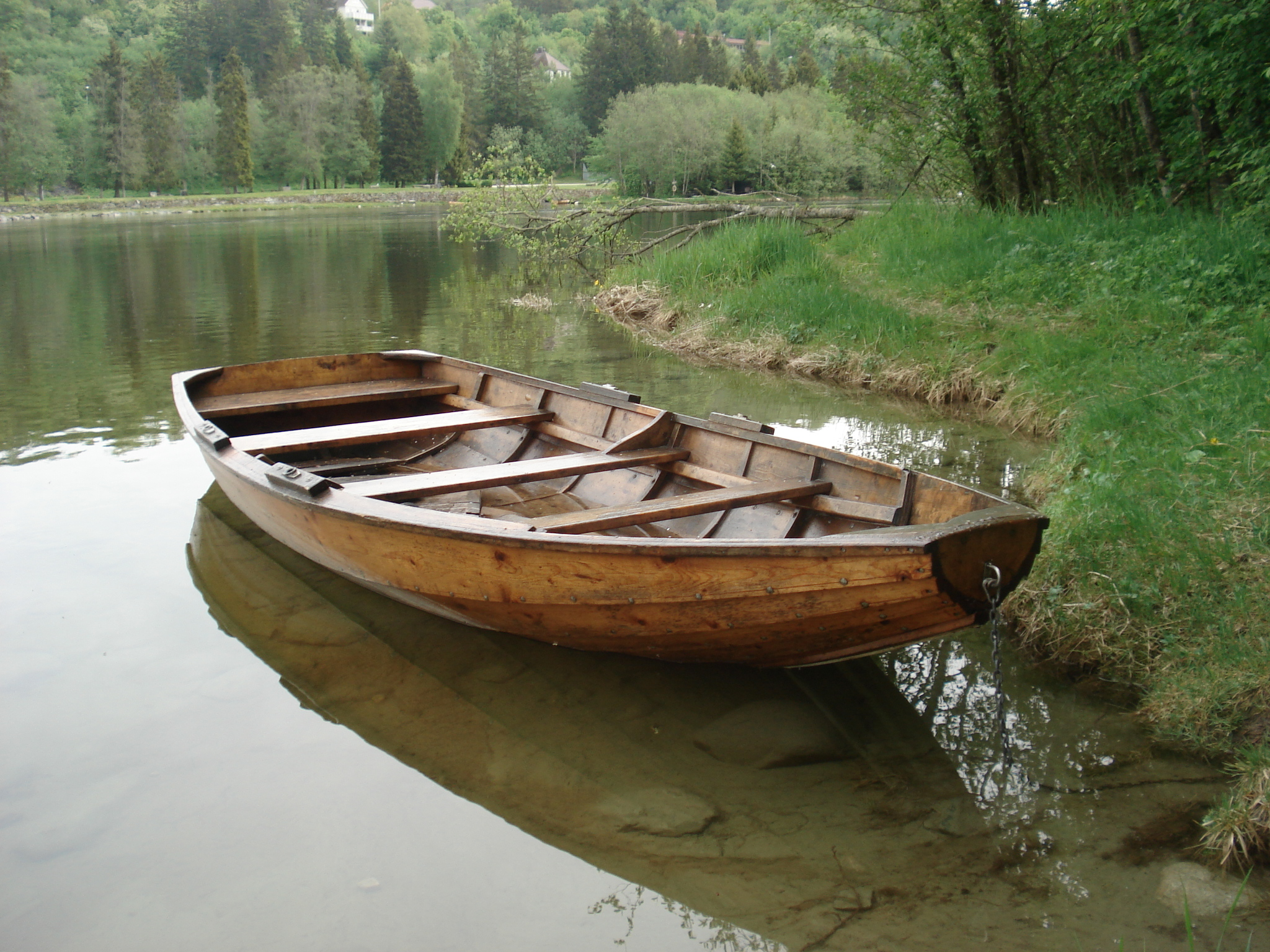 Pram I Nidelva, Trondheim